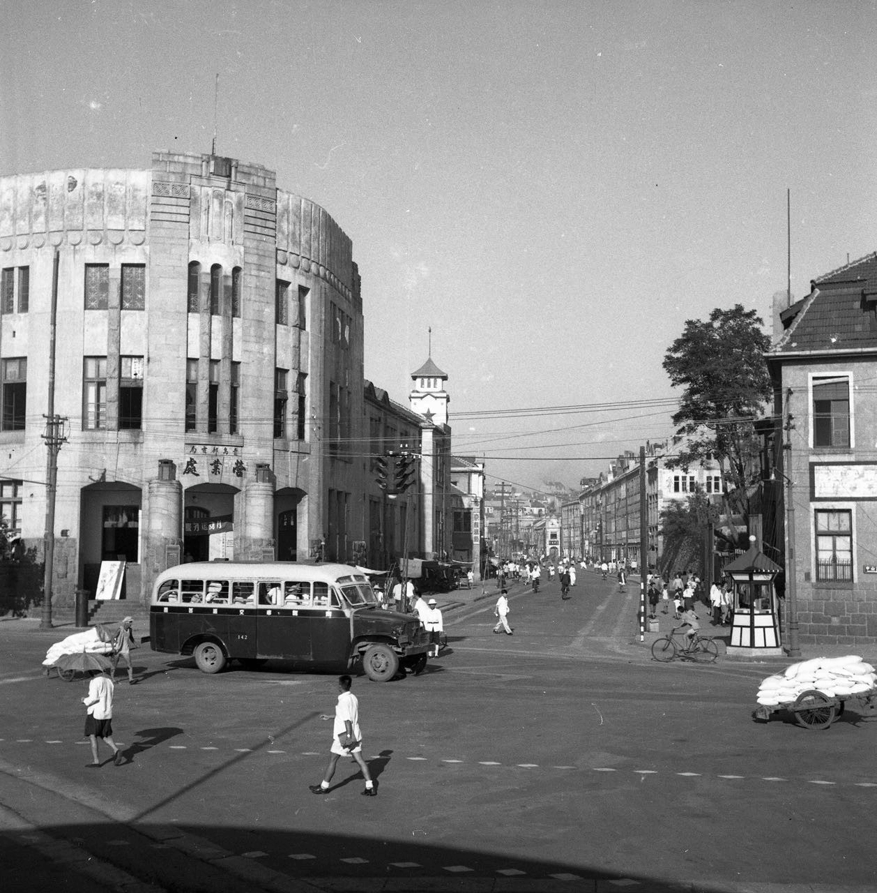 青岛堂邑路中山路市场三路路口旧影